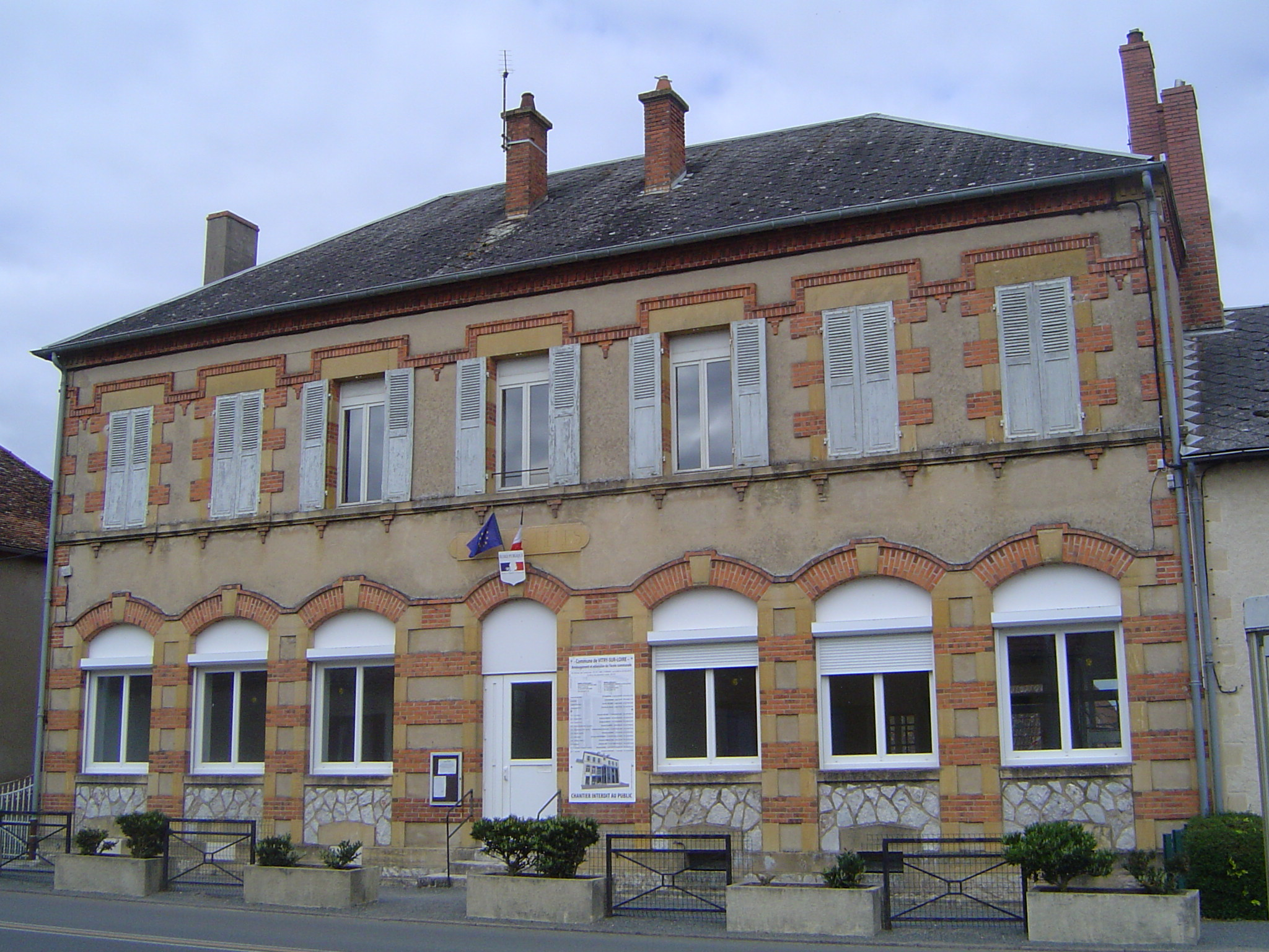 Vitry-sur-Loire (école)